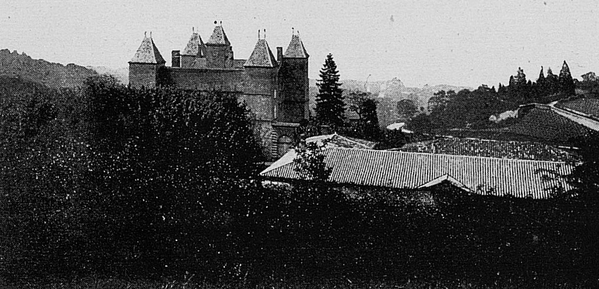 Dictionnaire illustré des communes du département du Rhône. Tome 1 / par MM. E. de Rolland et D. Clouzet.